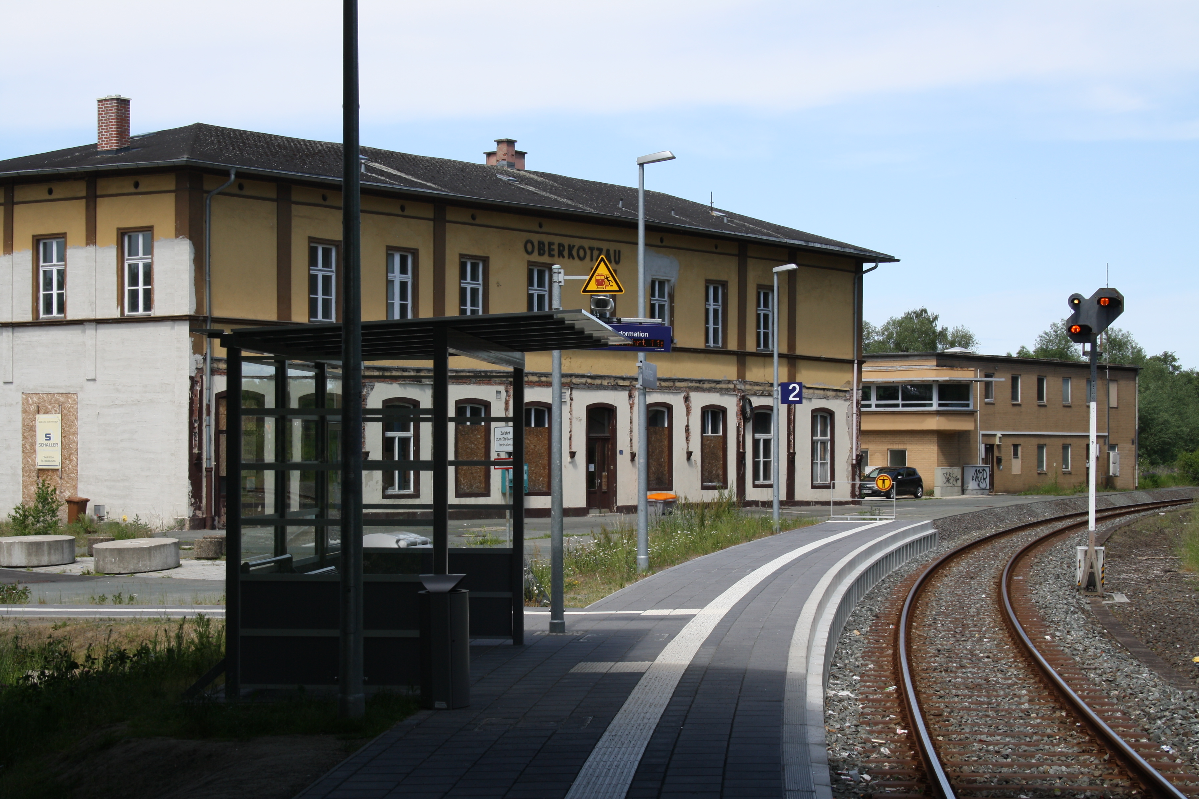 Bahnhof Oberkotzau Ostseite